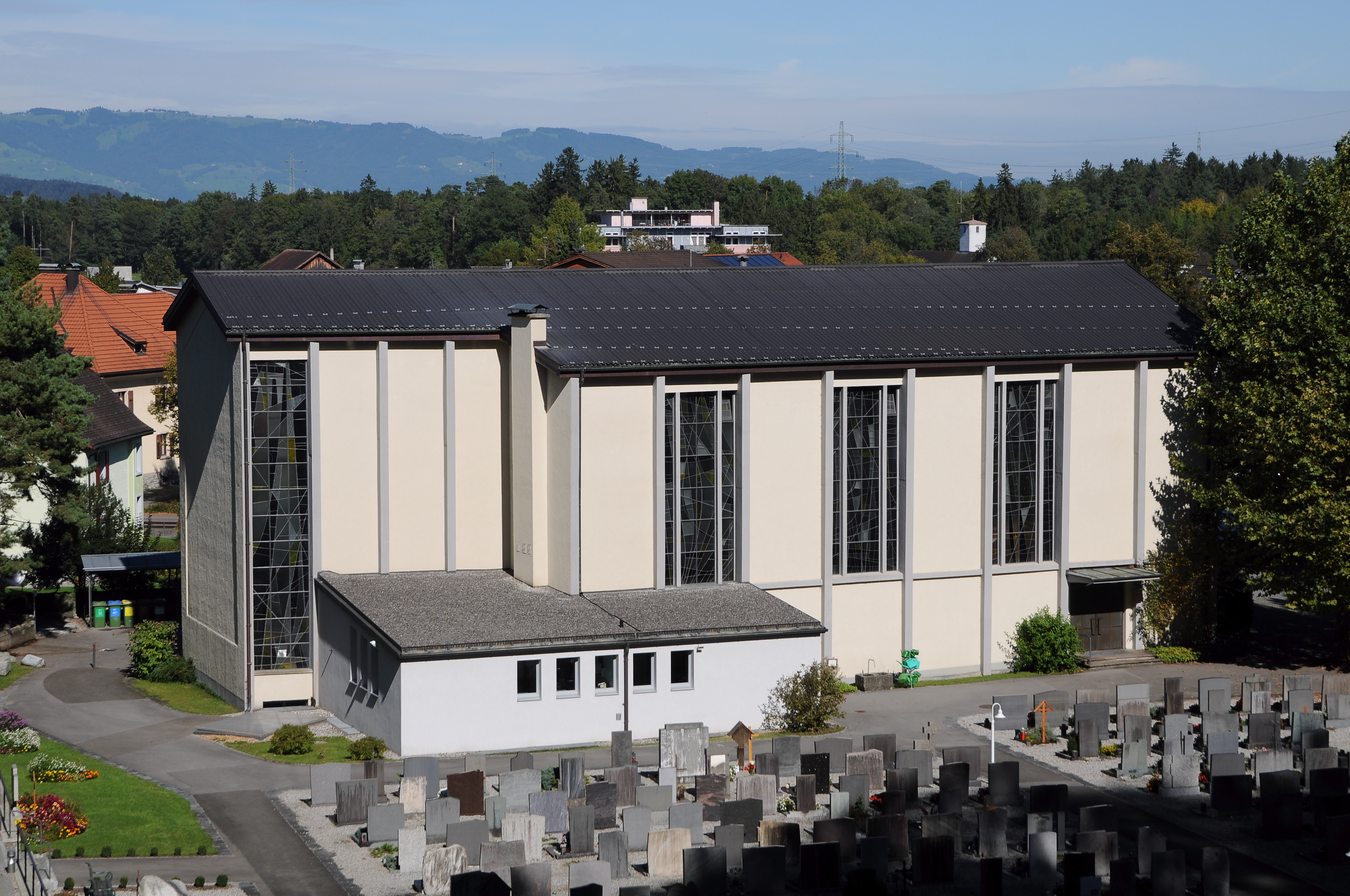 Blick von der Neuen Freschnerstrasse auf die Neue Nofler Pfarrkirche "Maria Heimsuchung" in Feldkirch, Vorarlberg.